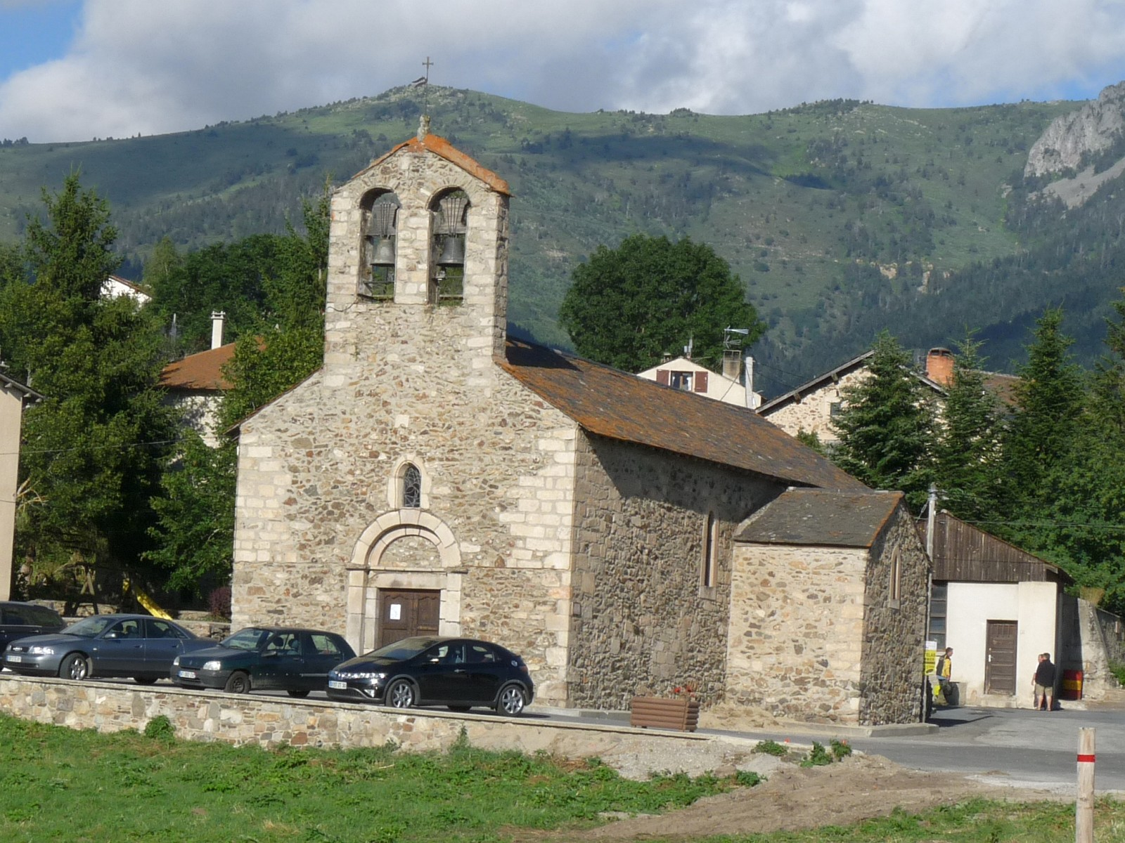 Eglise de Puyvalador, Pyrénées-Orientales, France